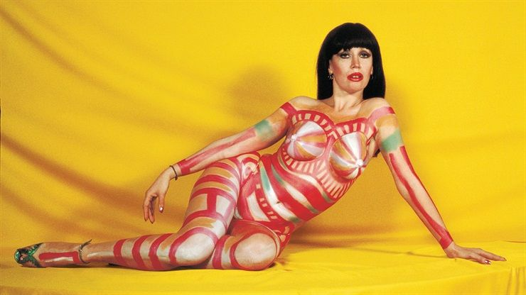 Body paint realizado por el artista plástico Edgardo Giménez sobre la vedette Moria Casán, happening de 1980.